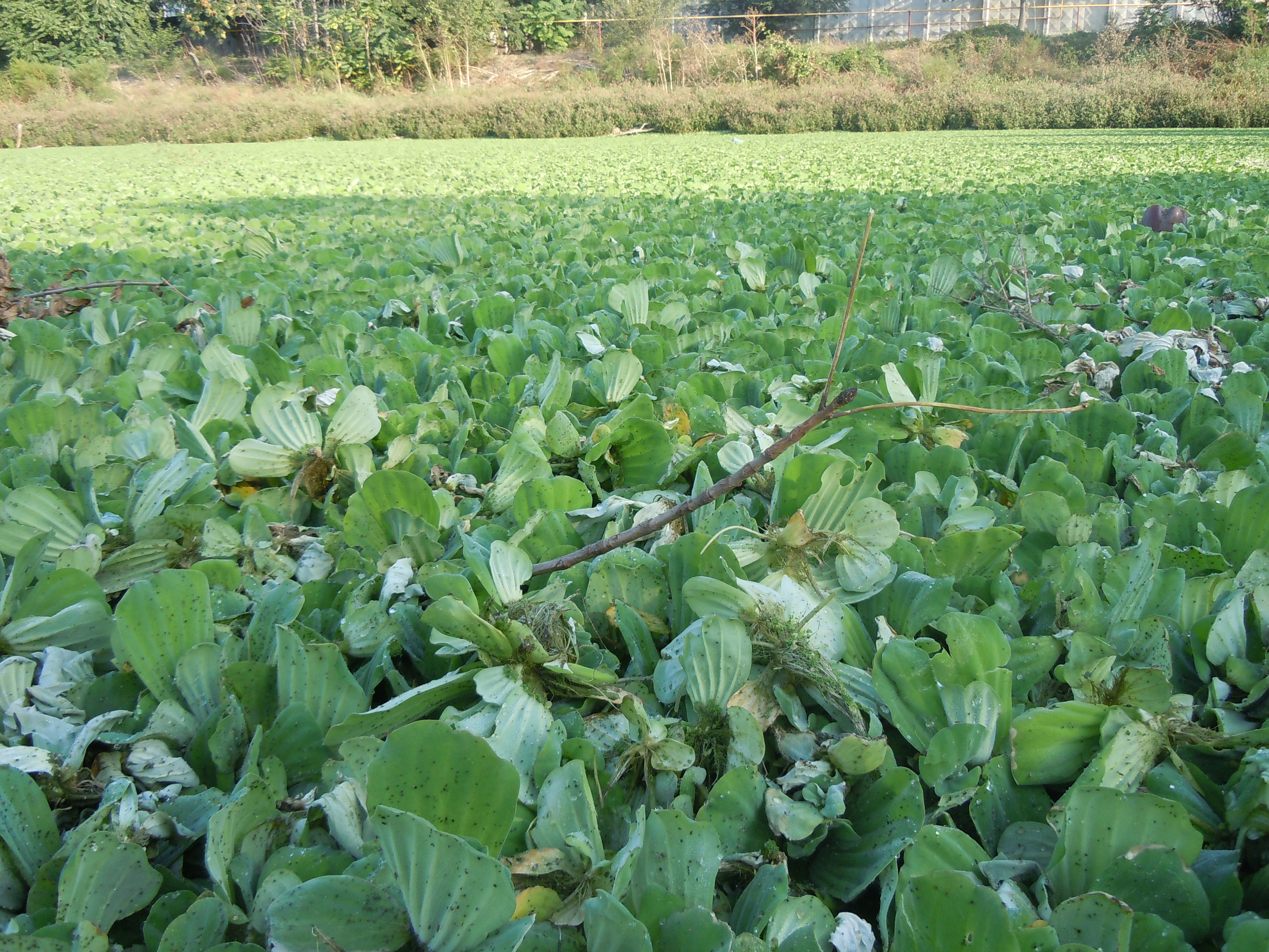 Ставок, вкритий водяним салатом (Pistia stratiotes), Одеса